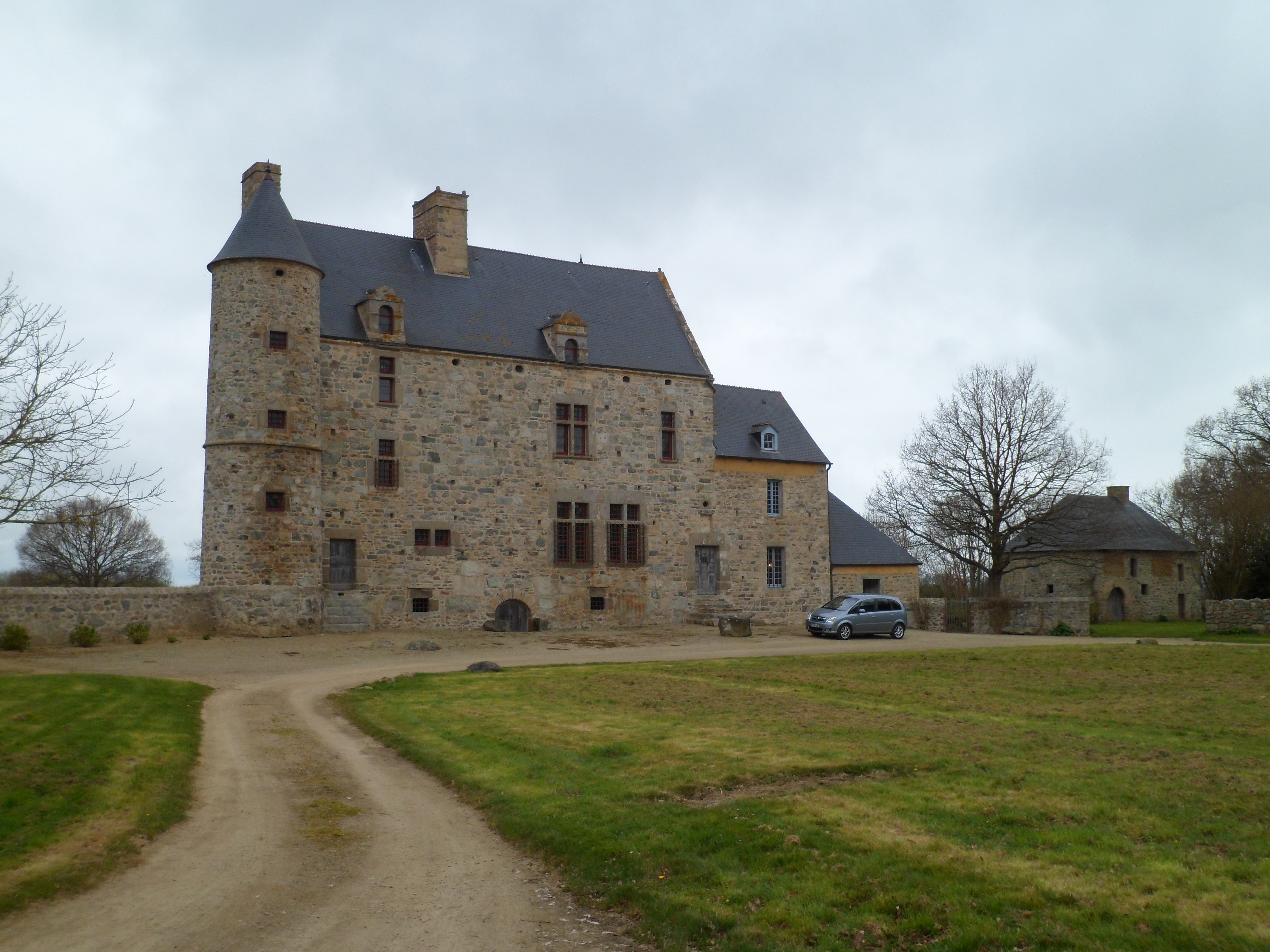 Manoir du Grand Taute, Saint-Sauveur-Lendelin